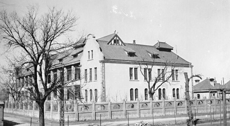 N. China, Prov. Chihli, Peking, Deutsches Hospital